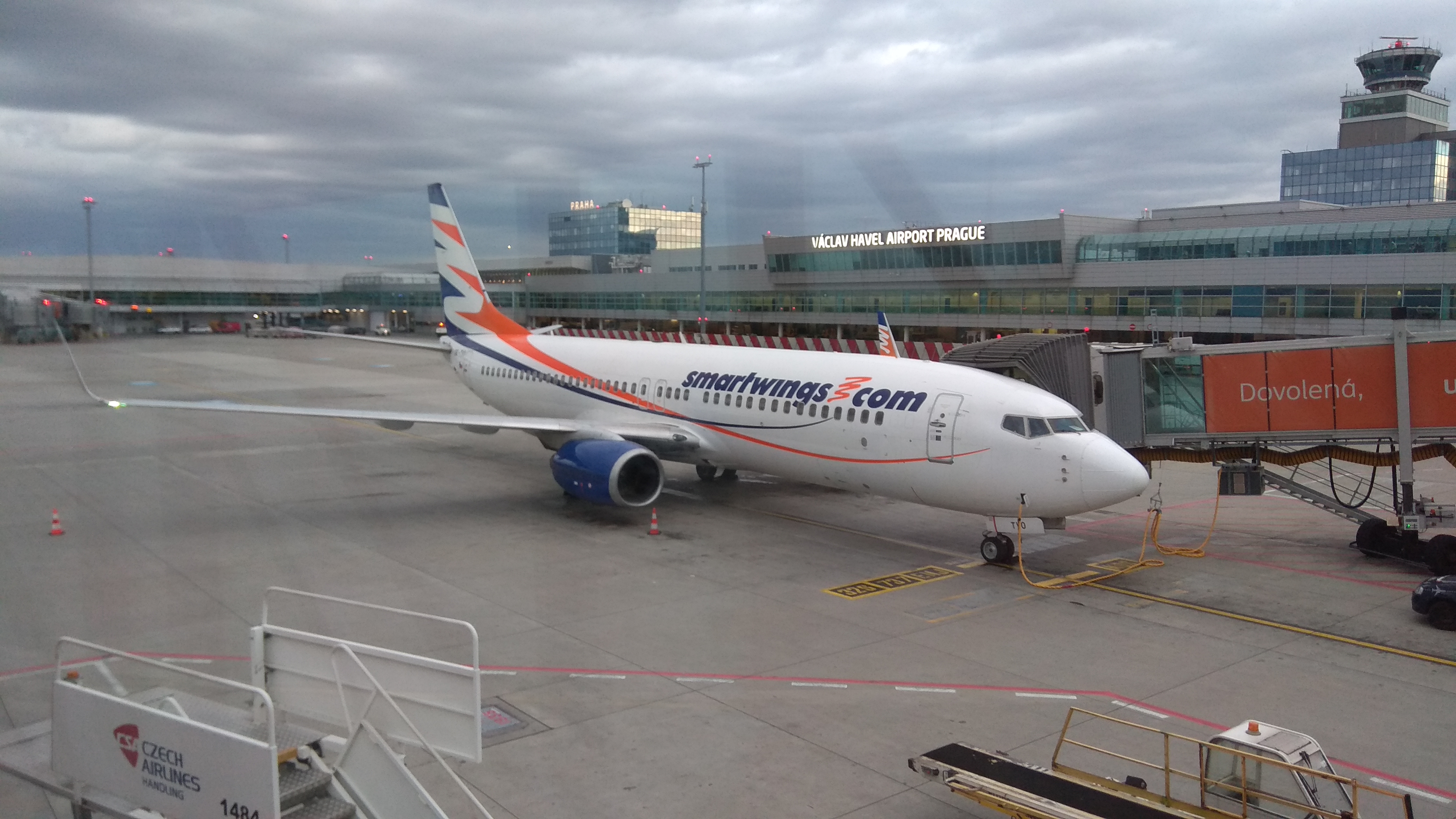 Boeing 737-800 registrace OK-TVO na letišti Praha-Ruzyně, říjen 2019